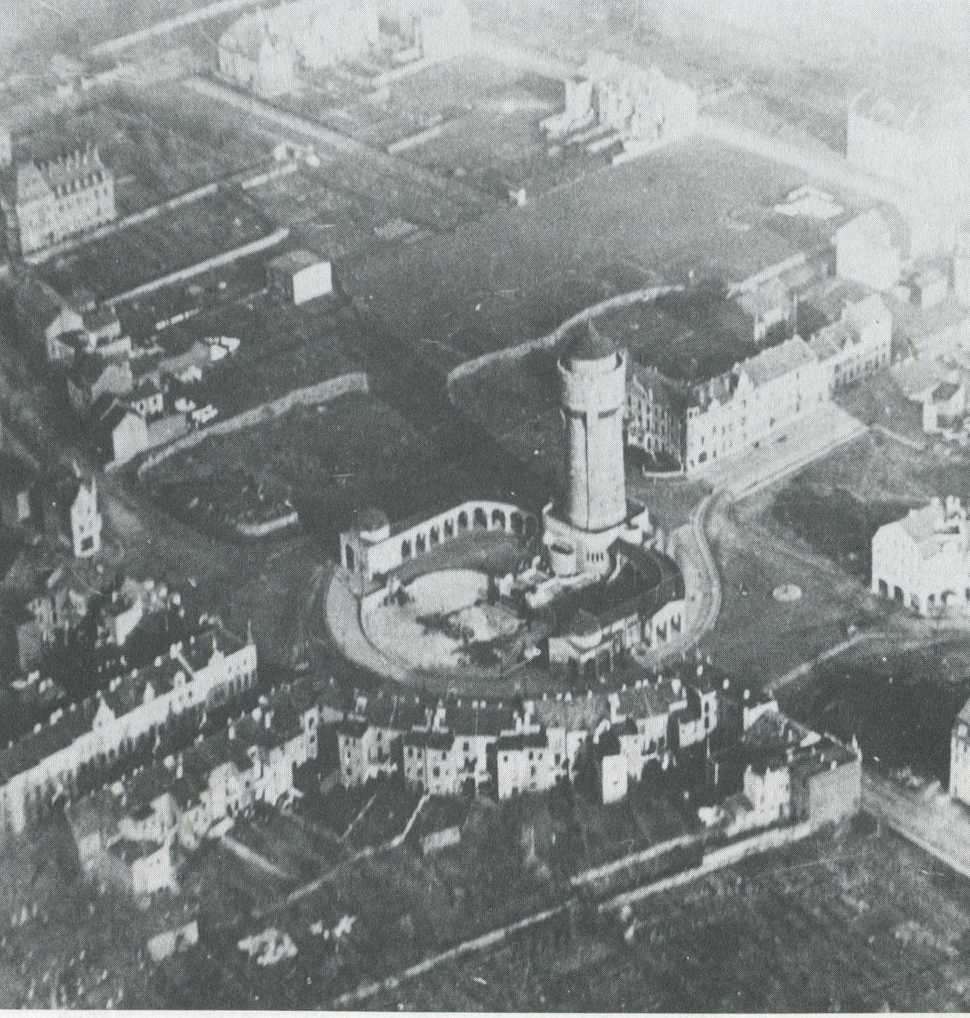 Der neue Wassxerturm in Düren, Kölnplatz